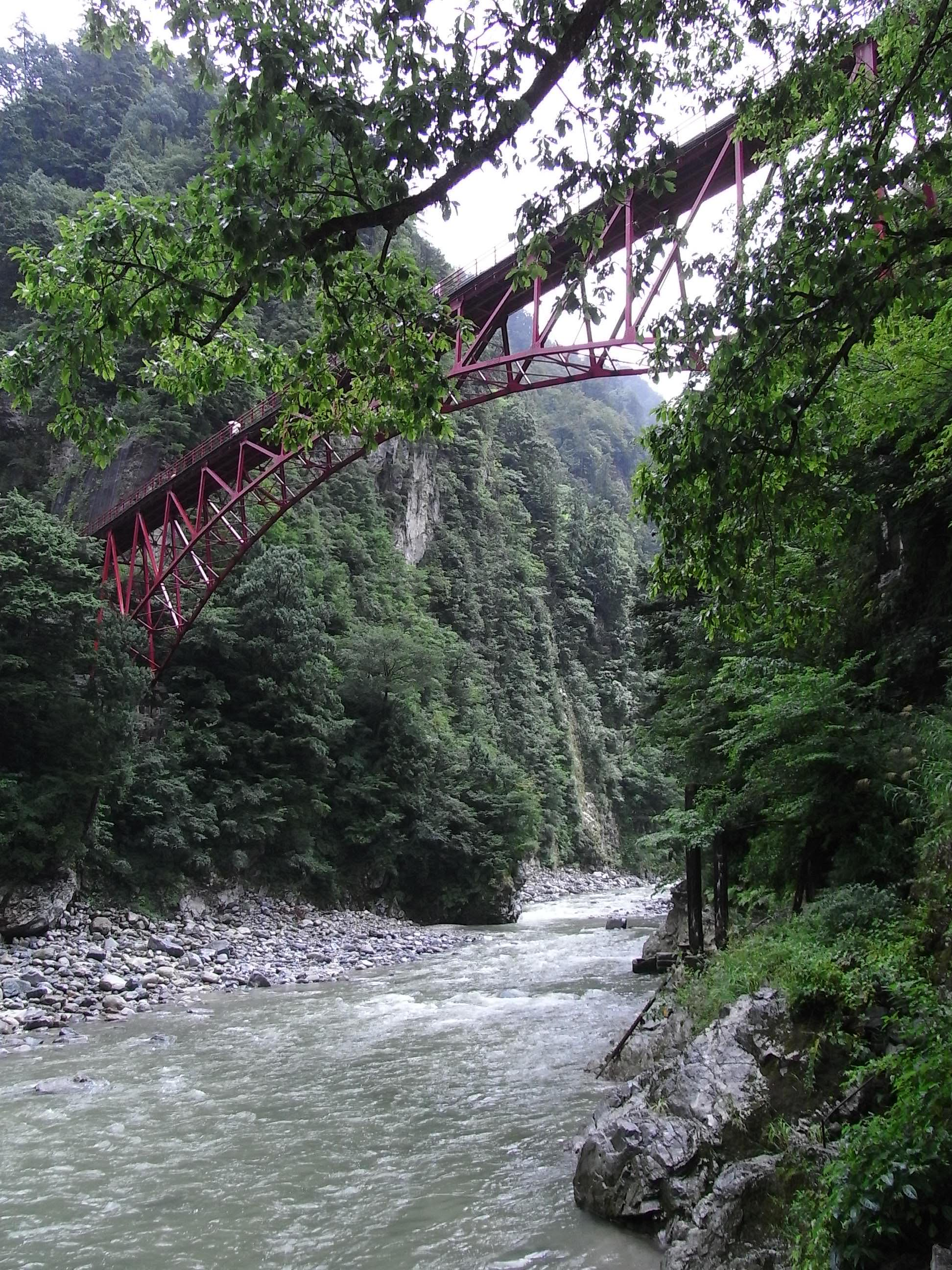 黒部渓谷 奥鐘橋